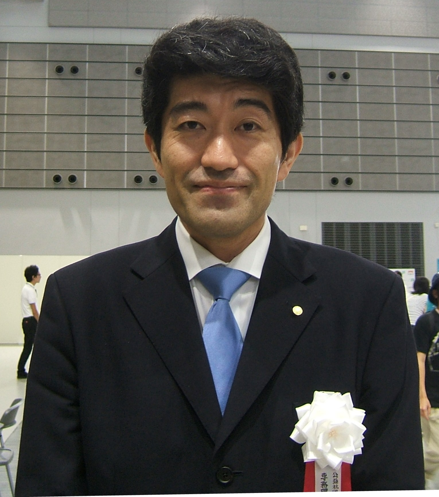 森内俊之九段（十八世名人資格者、日本将棋連盟専務理事）。2018年7月28日、「将棋日本シリーズ JTプロ公式戦／テーブルマークこども大会」東北大会にて。